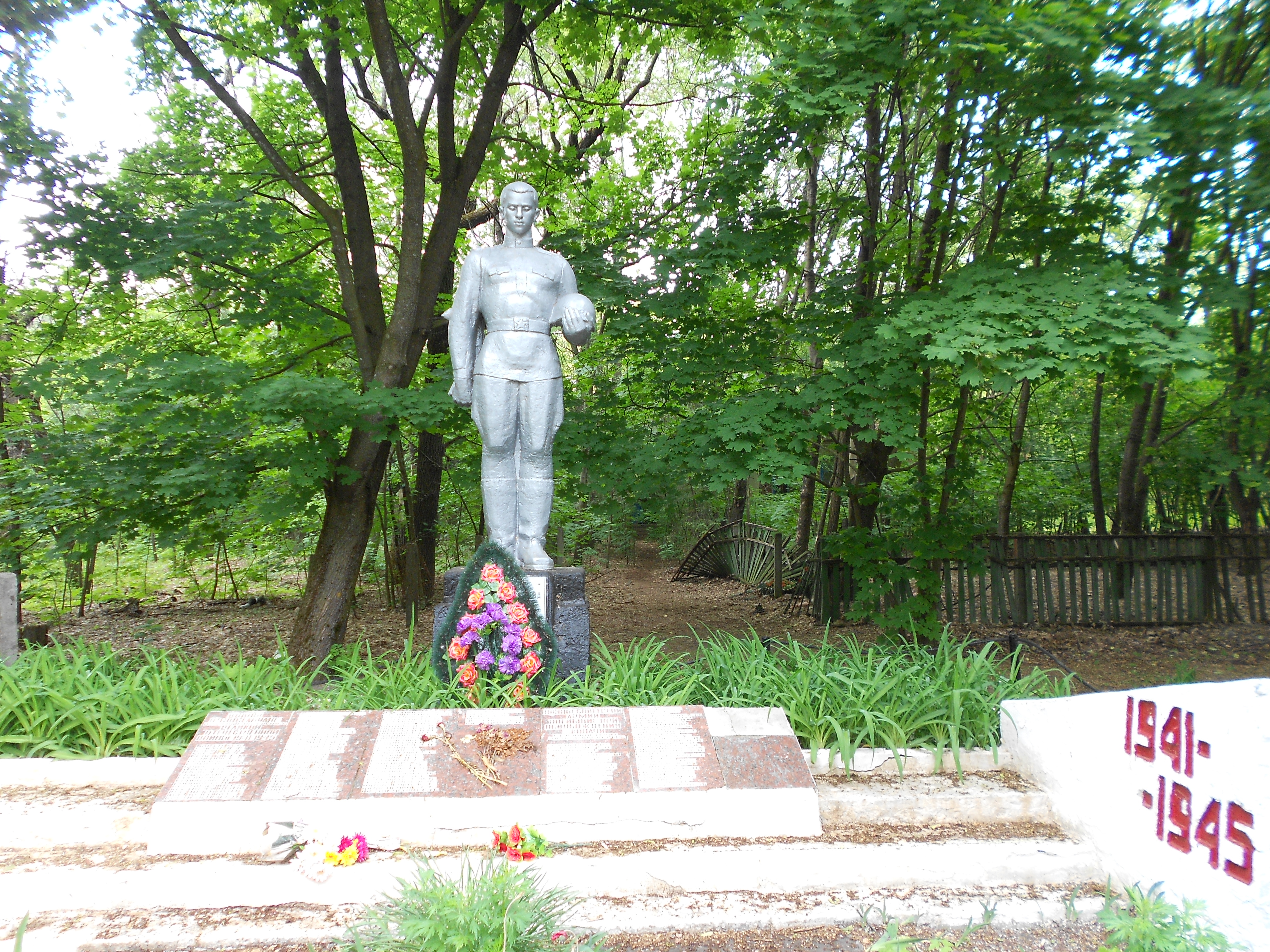 Памятник воинам Великой Отечествнной в заброшенном селе Копачи